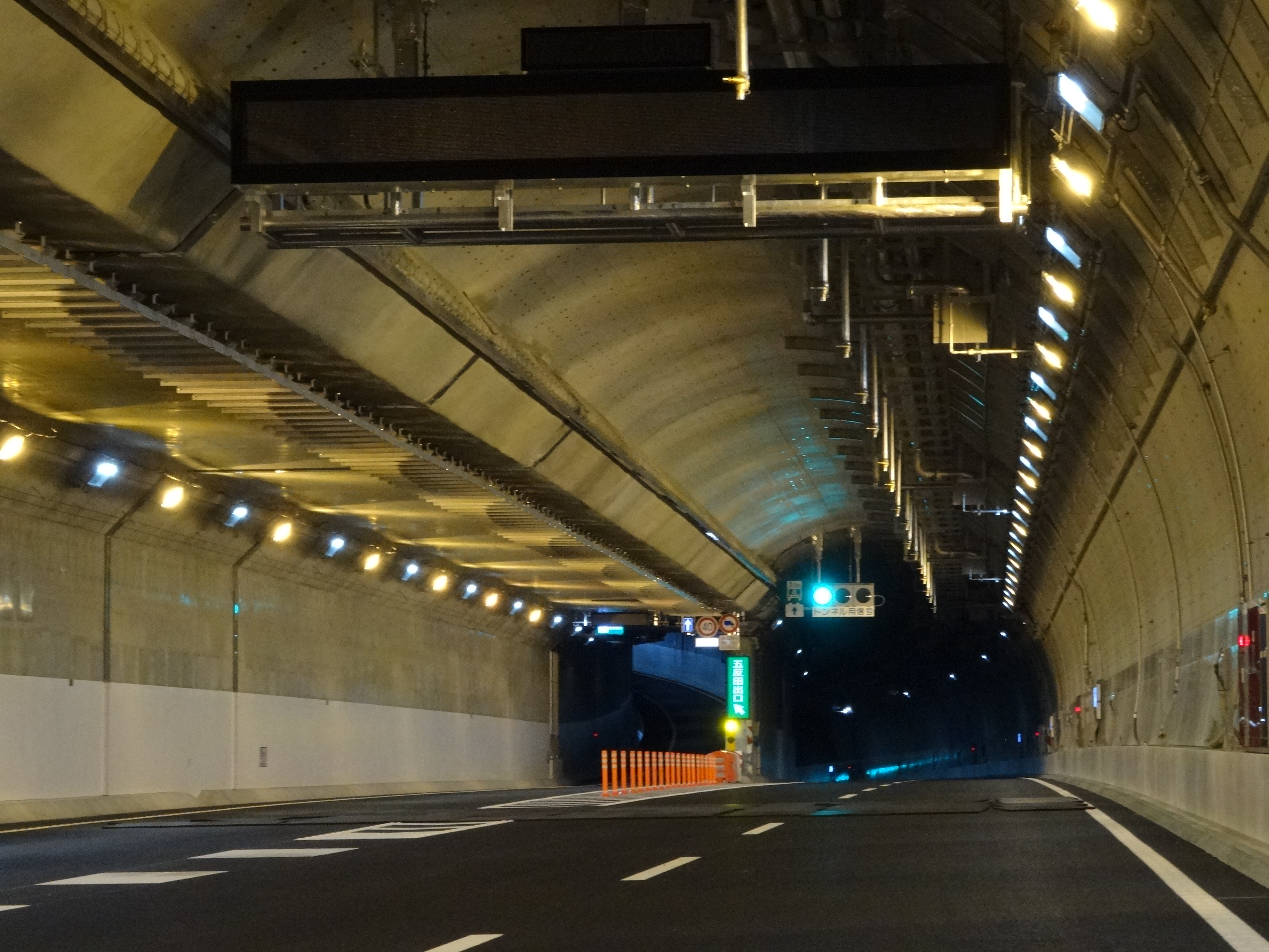 首都高速中央環状線大井方面の五反田出口 見学会にて撮影